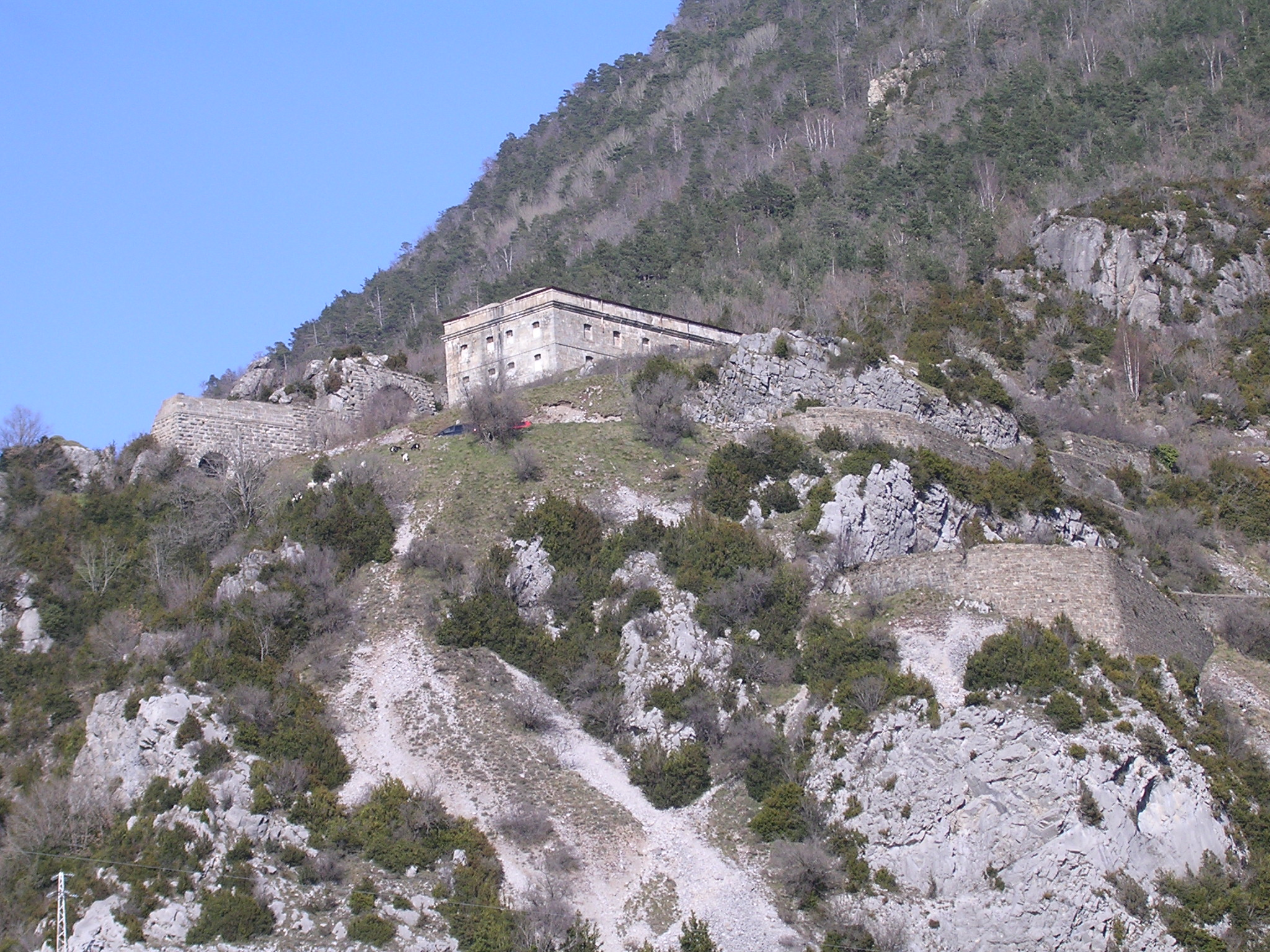 Aragonés: Fuerte de Santielena (Biescas)